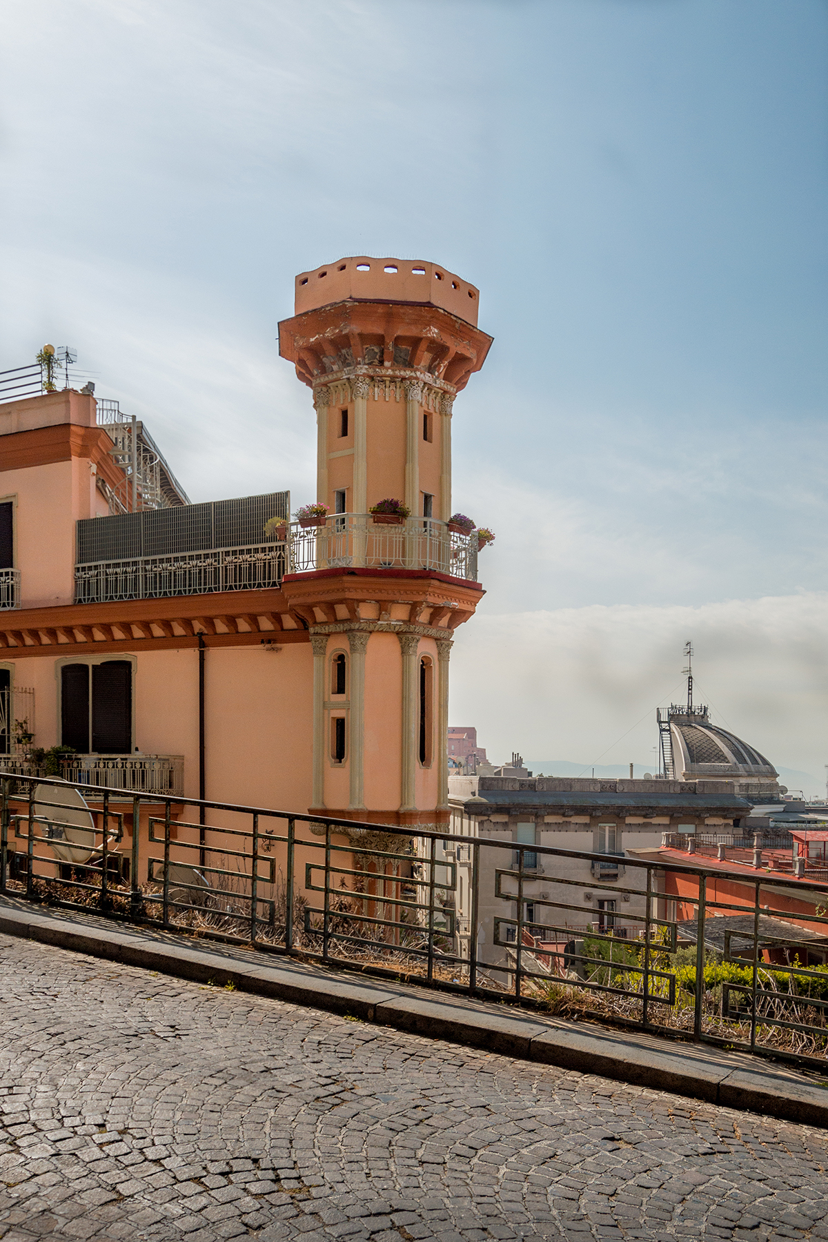 Torrino di Palazzina Velardi visto dalle Rampe Brancaccio